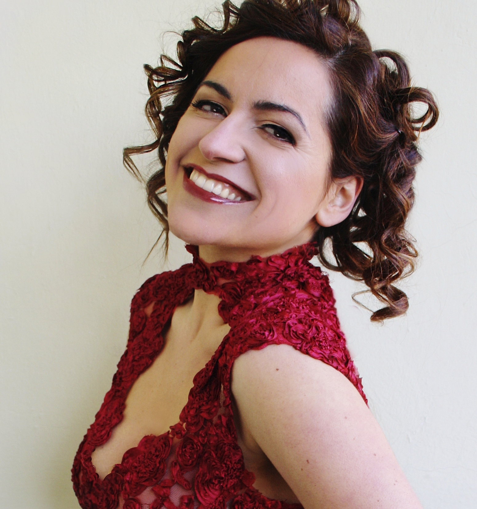 Anna Alàs i Jové, Mezzosopranistin